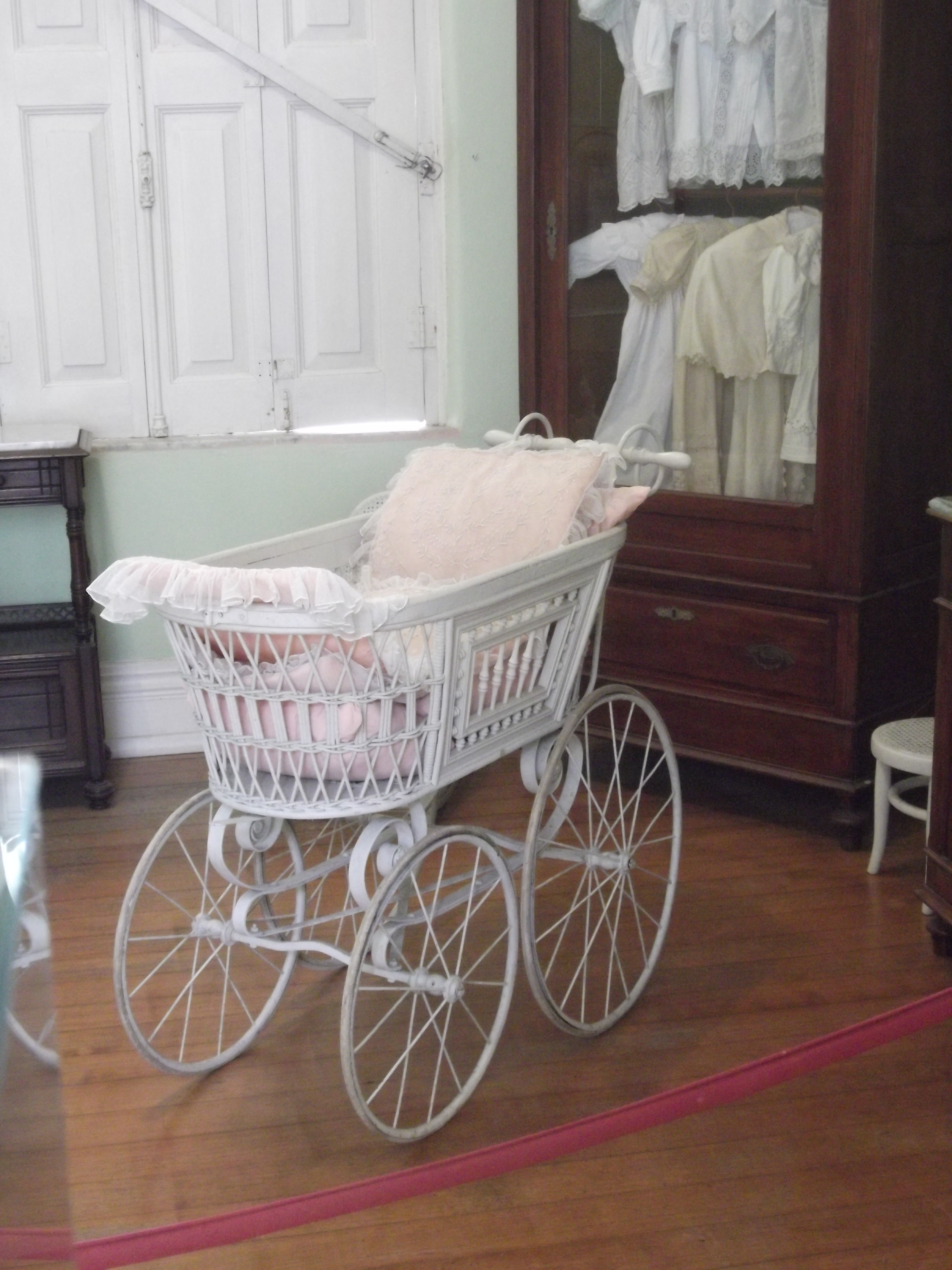 Museu da Baronesa